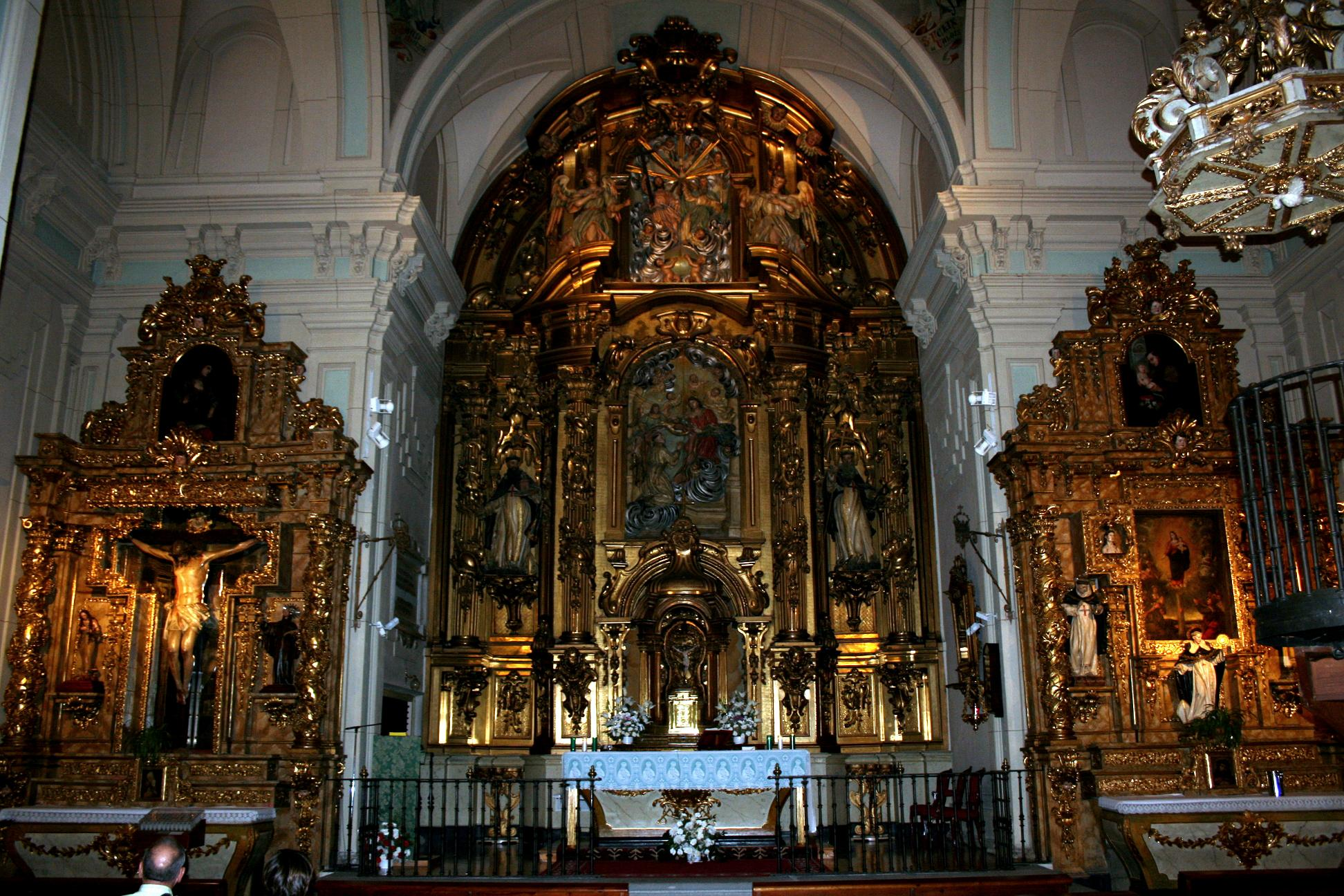 Fundado el convento en 1612, en él recibió sepultura Miguel de Cervantes y profesó sor Catalina de San Félix, hija de Lope de Vega, pero la fábrica actual corresponde a la remodelación iniciada en 1671 bajo la dirección de Marcos López y, más adelante, de José de Arroyo.